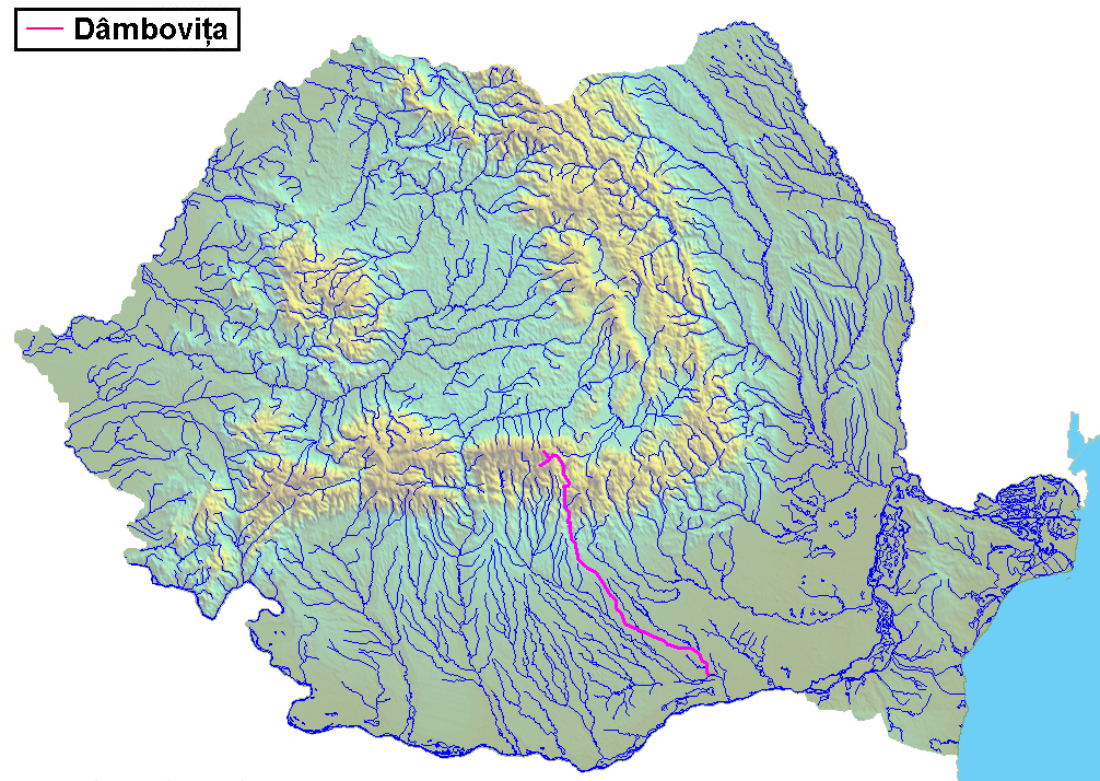 Raul_Dambovita